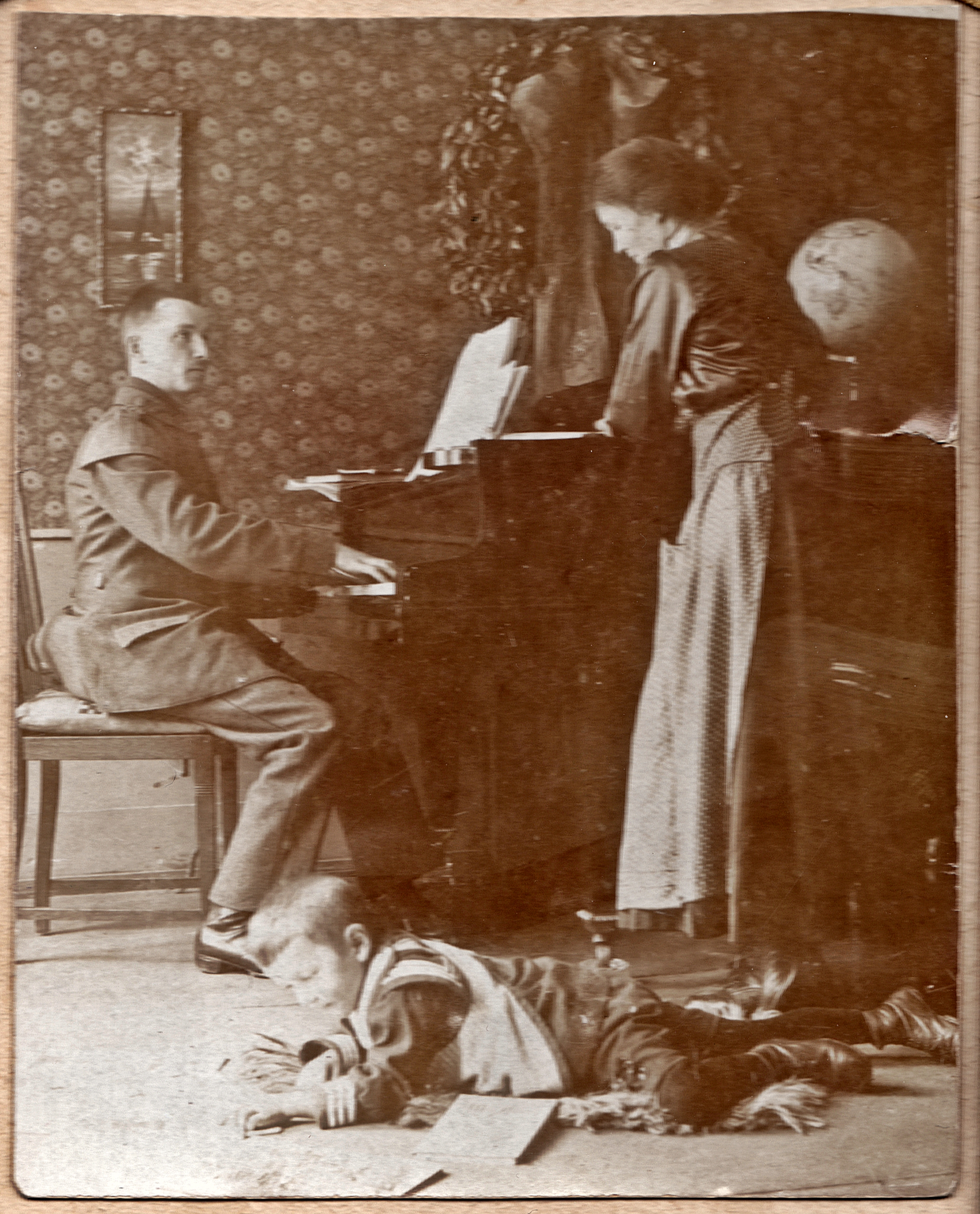 Der Musiklehrer Theodor Krüger (am Klavier) 1914 mit Ehefrau Marie(geborene Suerburg) und Sohn Walter in Celle, Am Heiligen Kreuz 27 ...